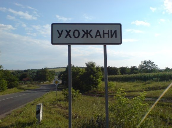 Въезд со стороны Песчаны